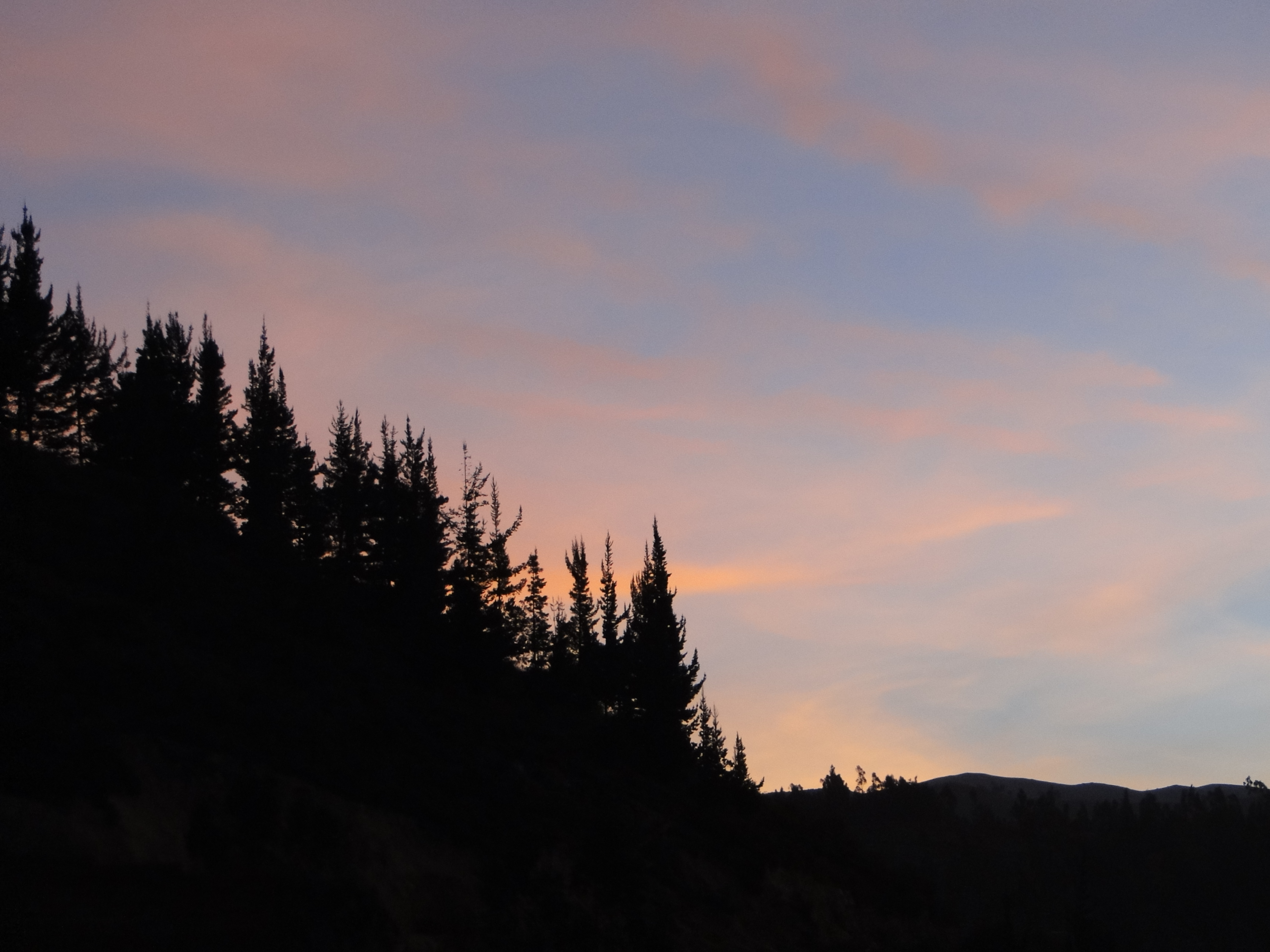 Toma fotográfica con acercamiento al cerro Huaihuaca con fondo de celajes.